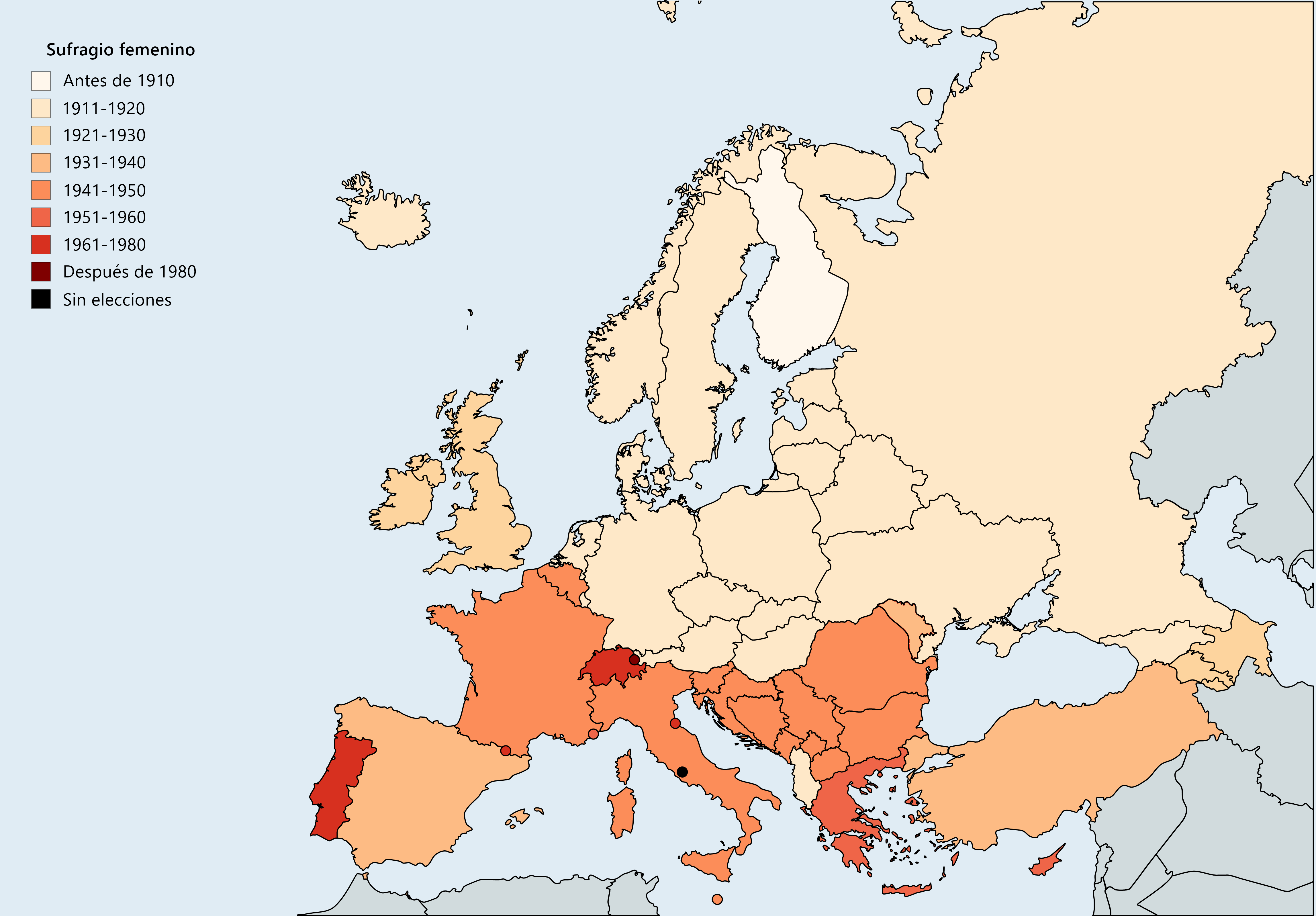 Mapa de países europeos y aledaños y la entrada en vigor del sufragio femenino por año.